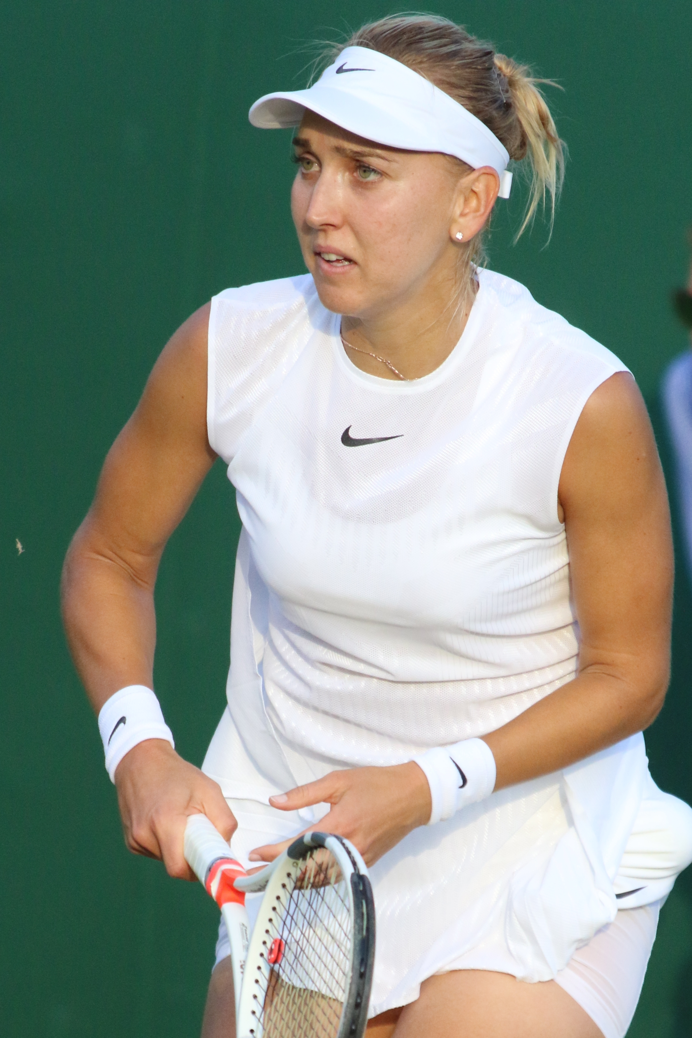 Vesnina WM17 (1)